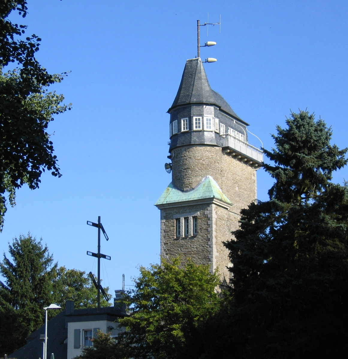 Danzturm mit fast umlaufendem Aussichtsbalkon in Iserlohn und dem Nachbau des ehemaligen Telegrafenmastes (1996 installiert) der optischen Telegrafenstation Nr. 43 (links im Bild), die Teil der 1835 eingerichteten Telegrafenlinie Berlin-Koblenz war.